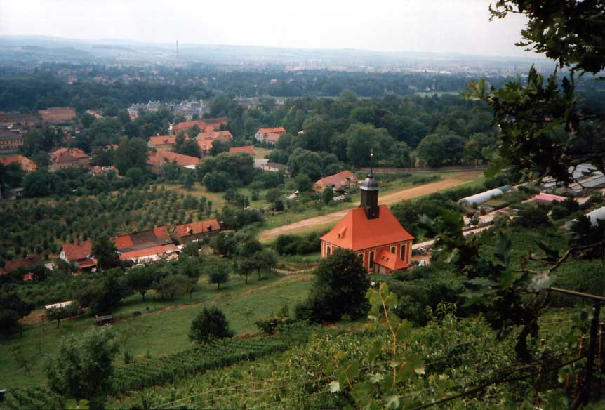 Weinbergkirche in Dresden-Pillnitz